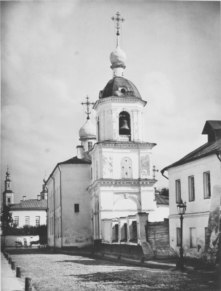 Церковь Знамения Пресвятой Богородицы на Знаменке в Москве